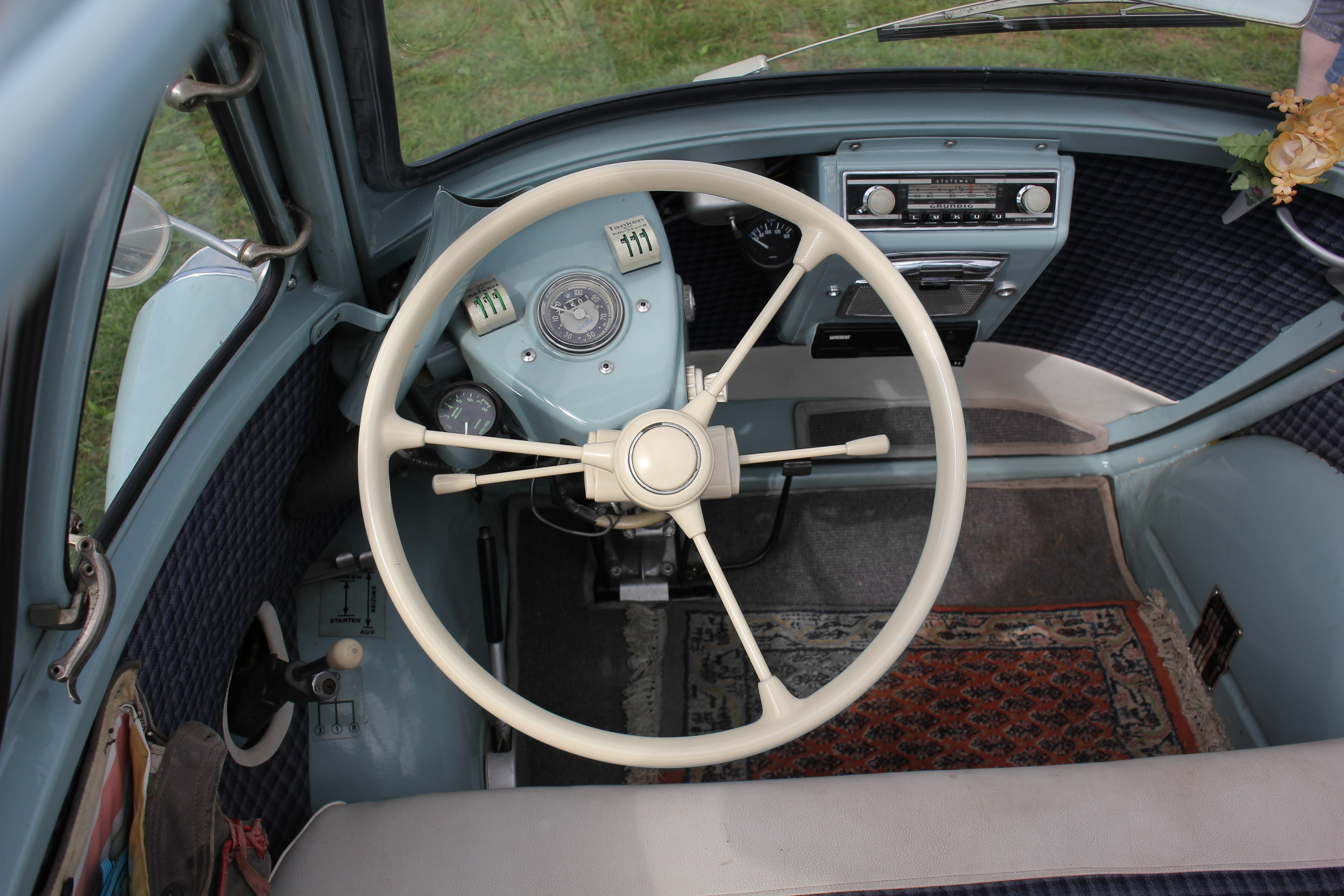 Cockpit einer BMW Isetta, Baujahr 1955, beim Isetta-Treffen in Bad Wörishofen